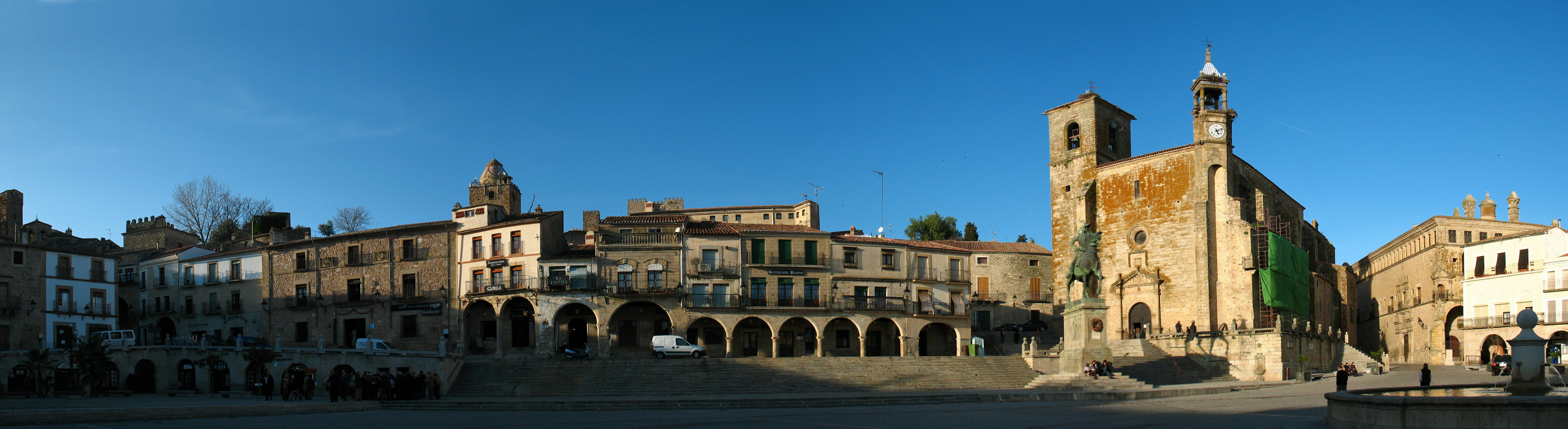 Panorámica de la plaza Mayor de Trujillo (Cáceres, España)